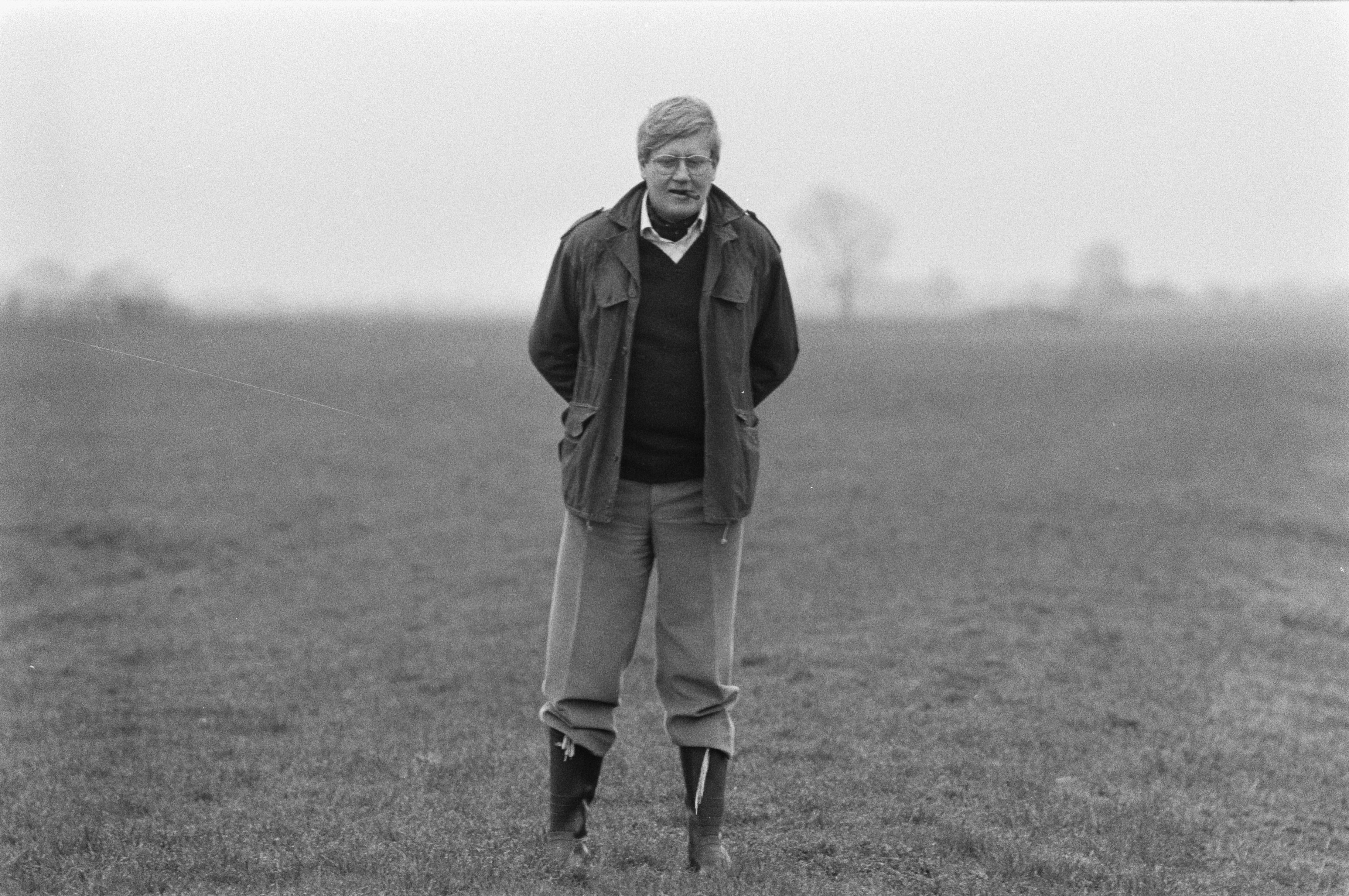 Collectie / Archief : Fotocollectie Anefo Reportage / Serie : [ onbekend ] Beschrijving : Wiegel zoekt kievitseieren uit protest tegen nieuwe vogel CdK Wiegel zoekt eieren Datum : 10 april 1985 Trefwoorden : KIEVITSEIEREN, protesten Fotograaf : Bogaerts, Rob / Anefo Auteursrechthebbende : Nationaal Archief Materiaalsoort : Negatief (zwart/wit) Nummer archiefinventaris : bekijk toegang 2.24.01.05 Bestanddeelnummer : 933-2901